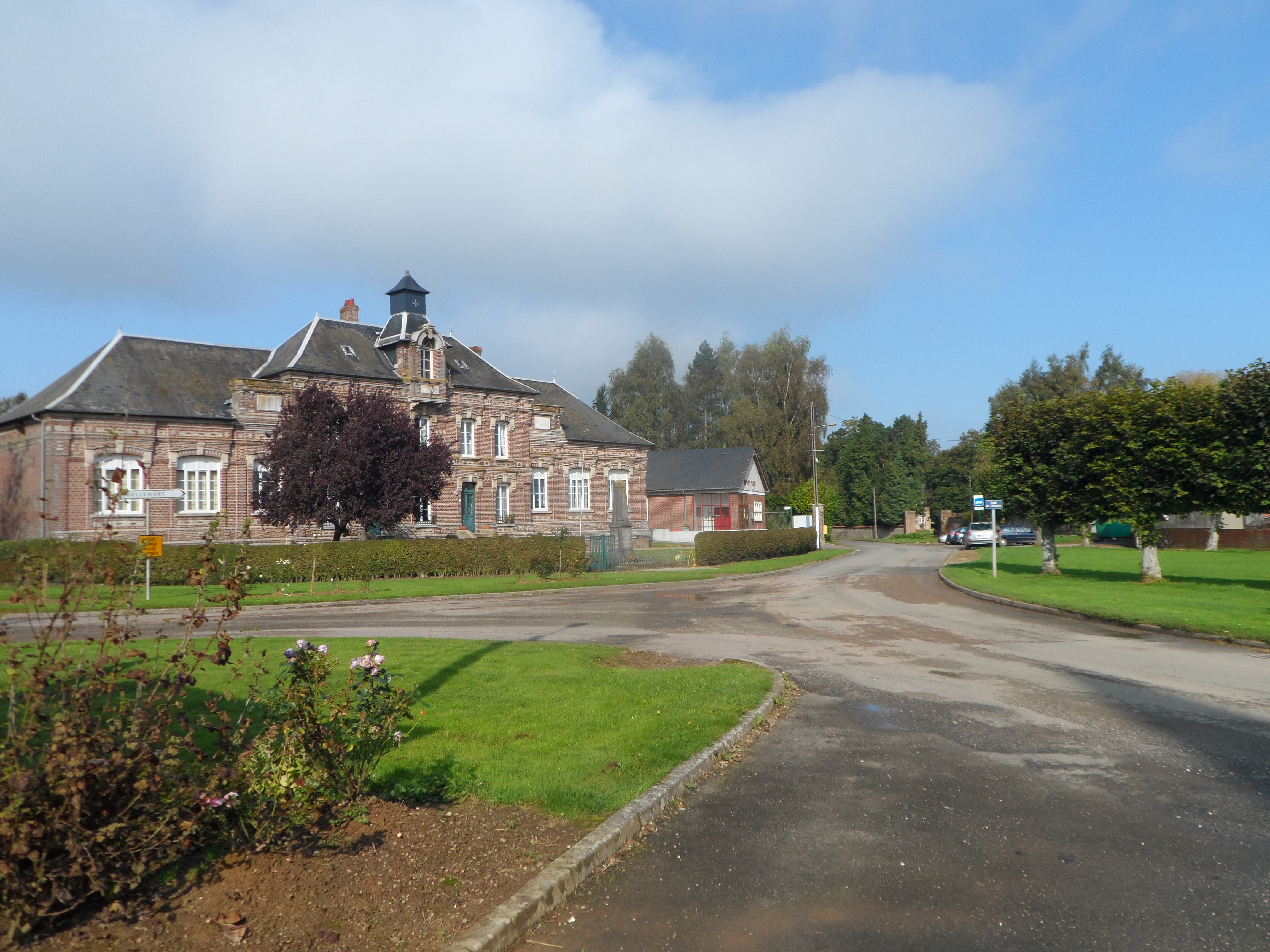 Mairie Ecole de Illois 76390 France